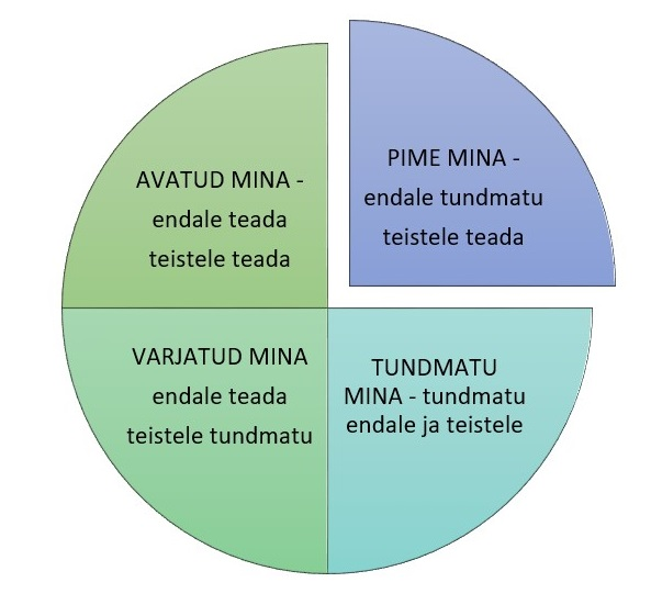 Eneseavamise erinevad alad Johari aknana. Kirjeldatud on nii enda kui teiste poolt tajutav.